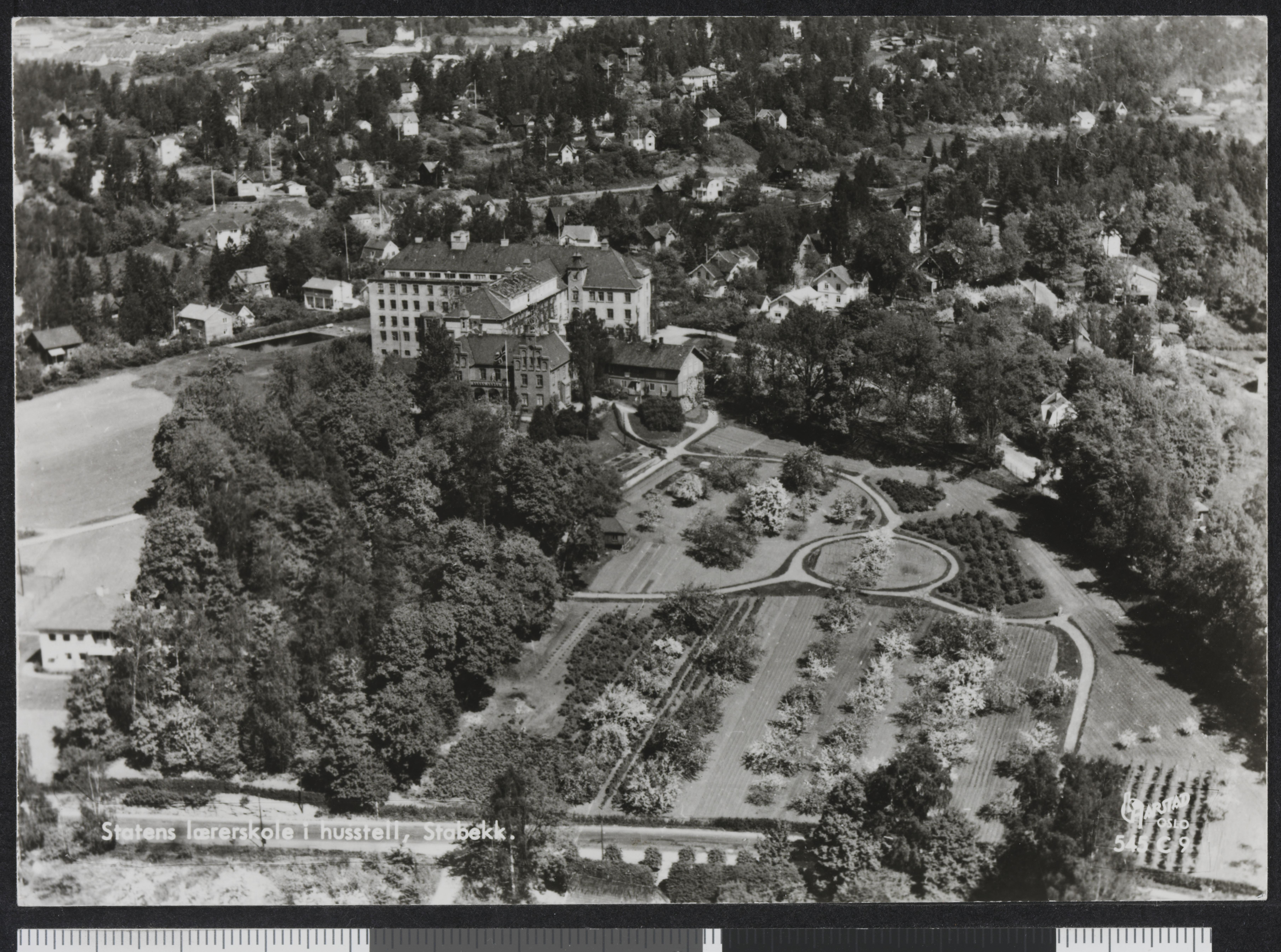 Bildet er hentet fra Nasjonalbibliotekets bildesamling Bærum,Stabekk, Bærum, Akershus